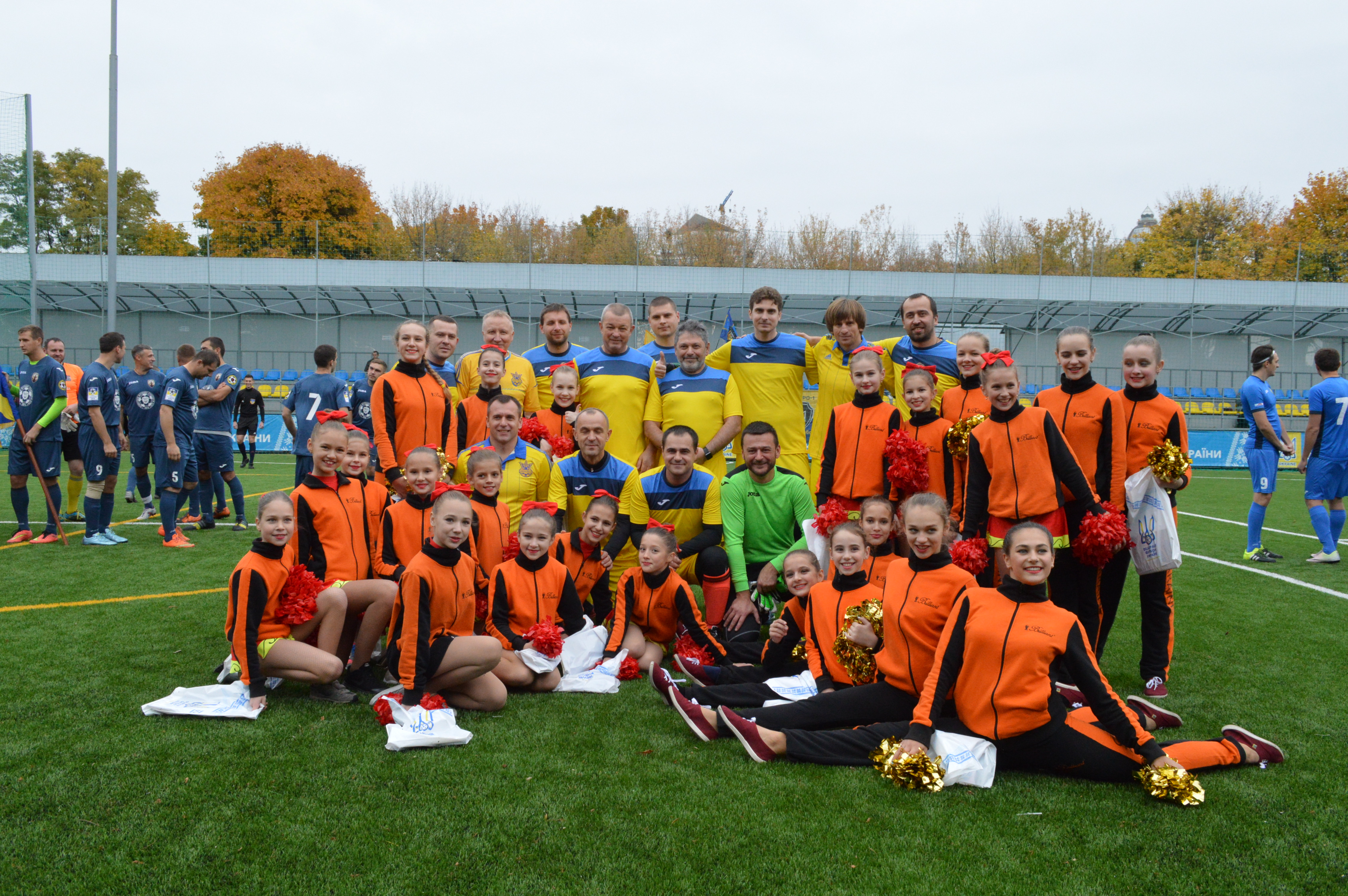 Кубок Незалежності-2017 ЗНД